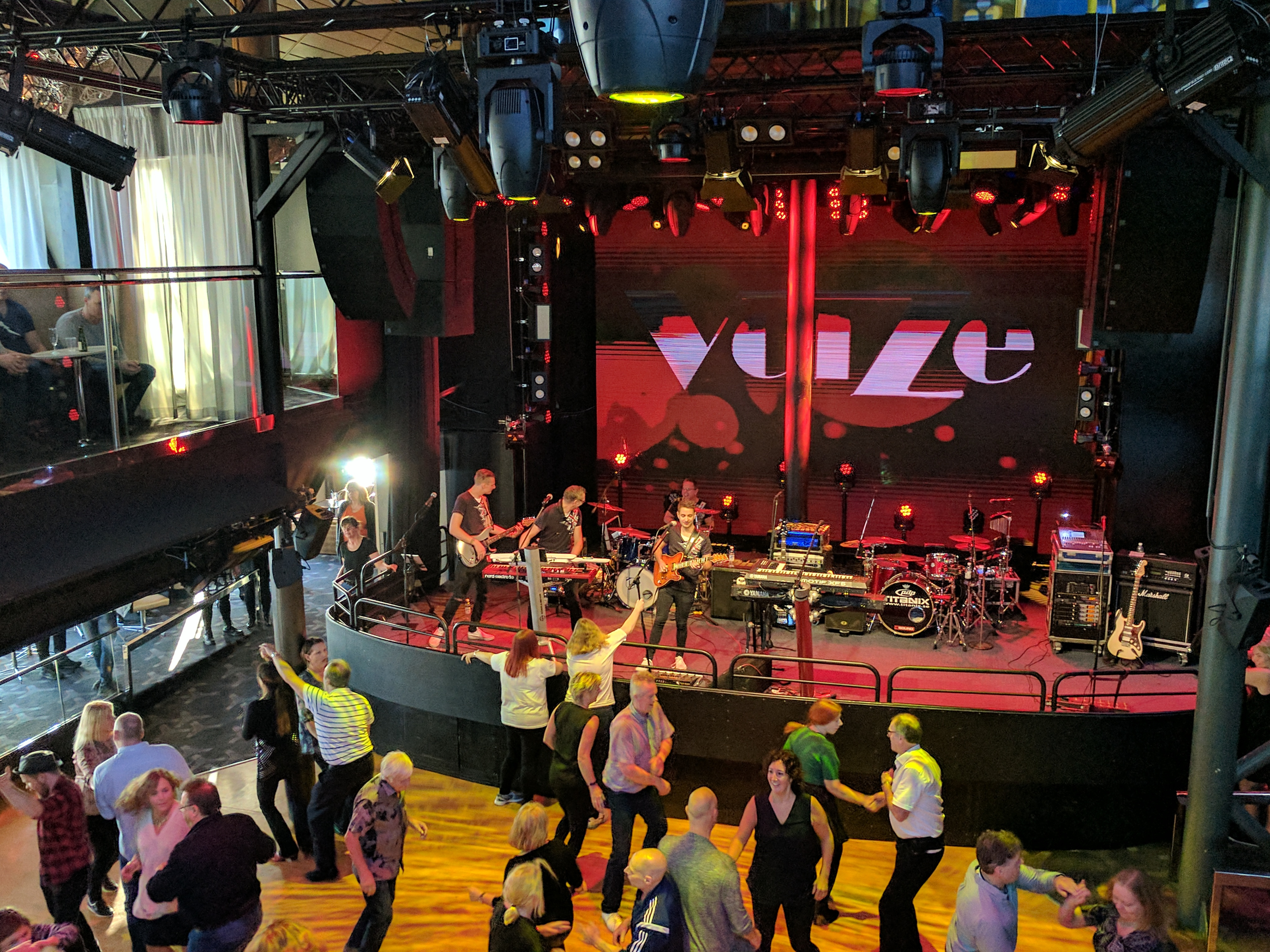 Voize på Cinderella